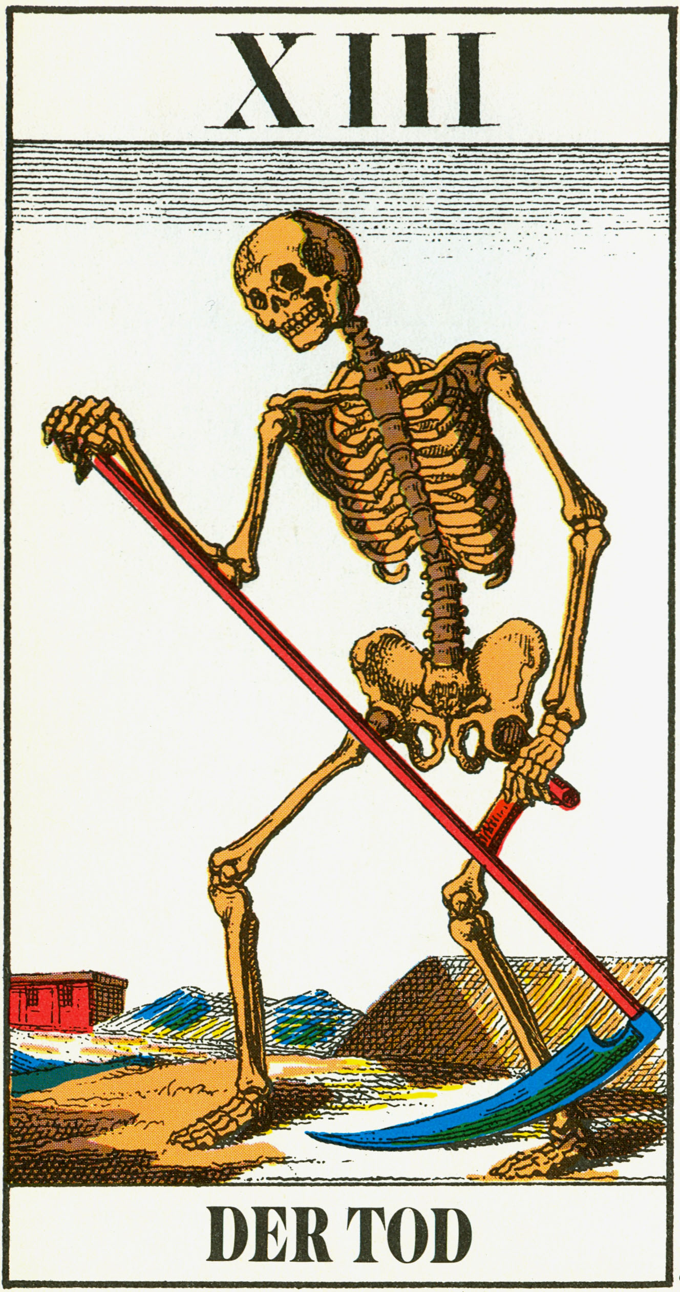 Troccas-Karte XIII, der Tod